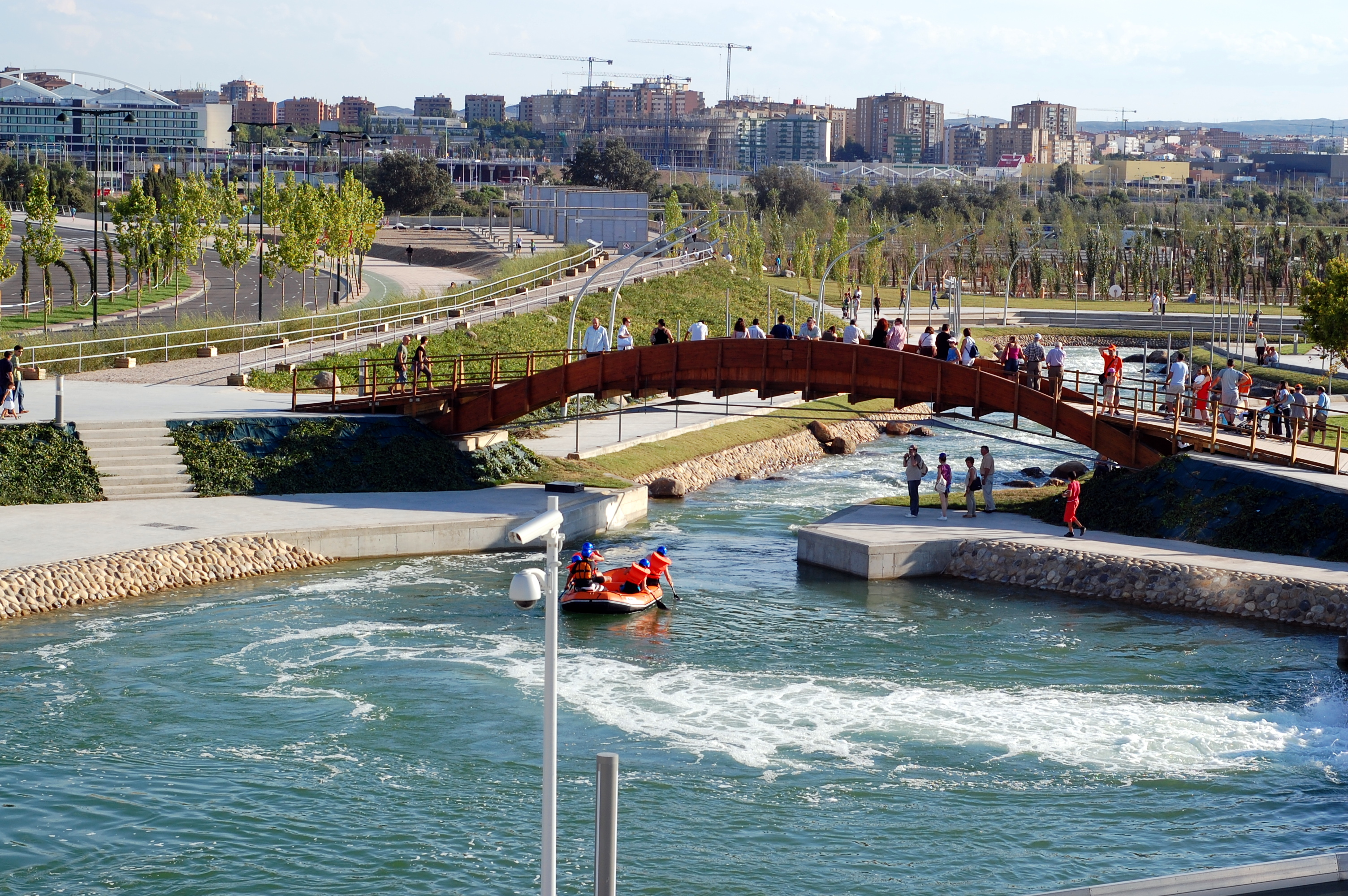 Canal de aguas bravas al lado del recinto Expo.